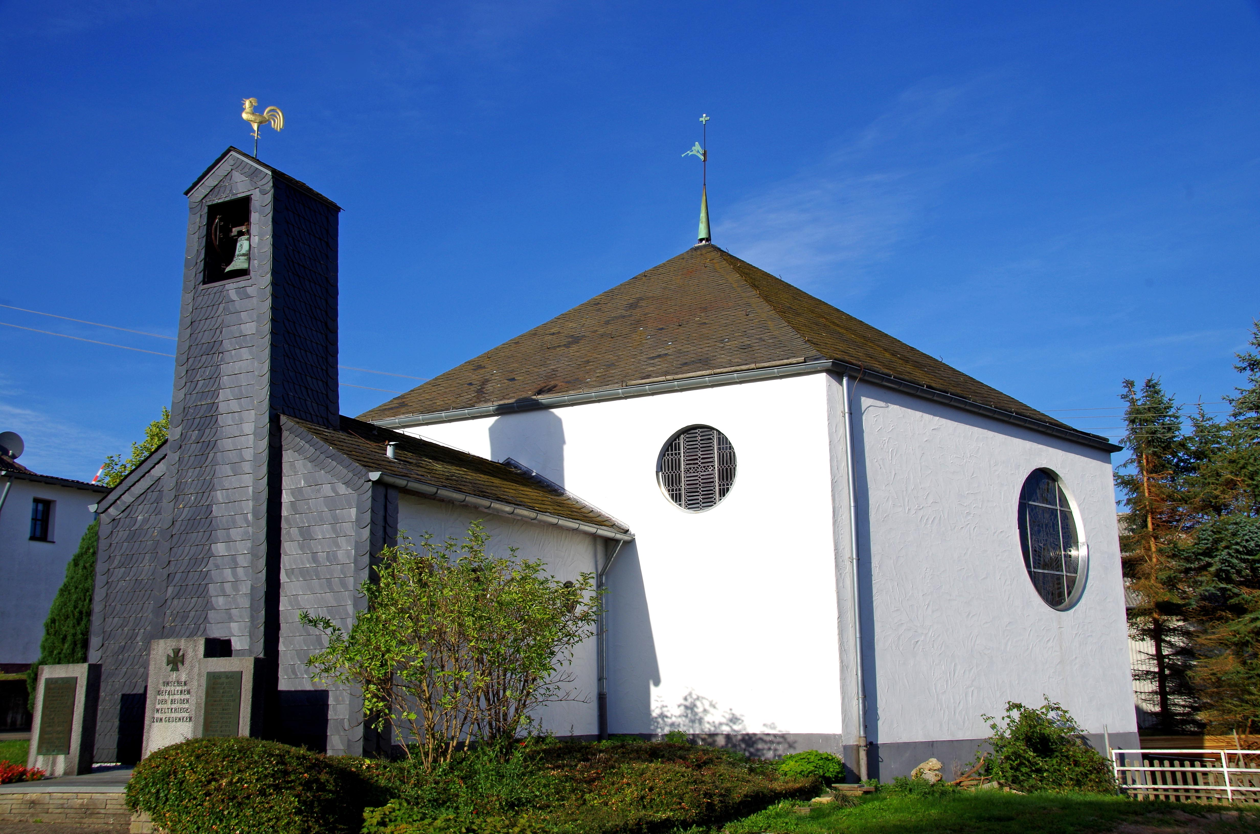 Muttergotteskapelle Ettelscheid, Außenansicht von Süden